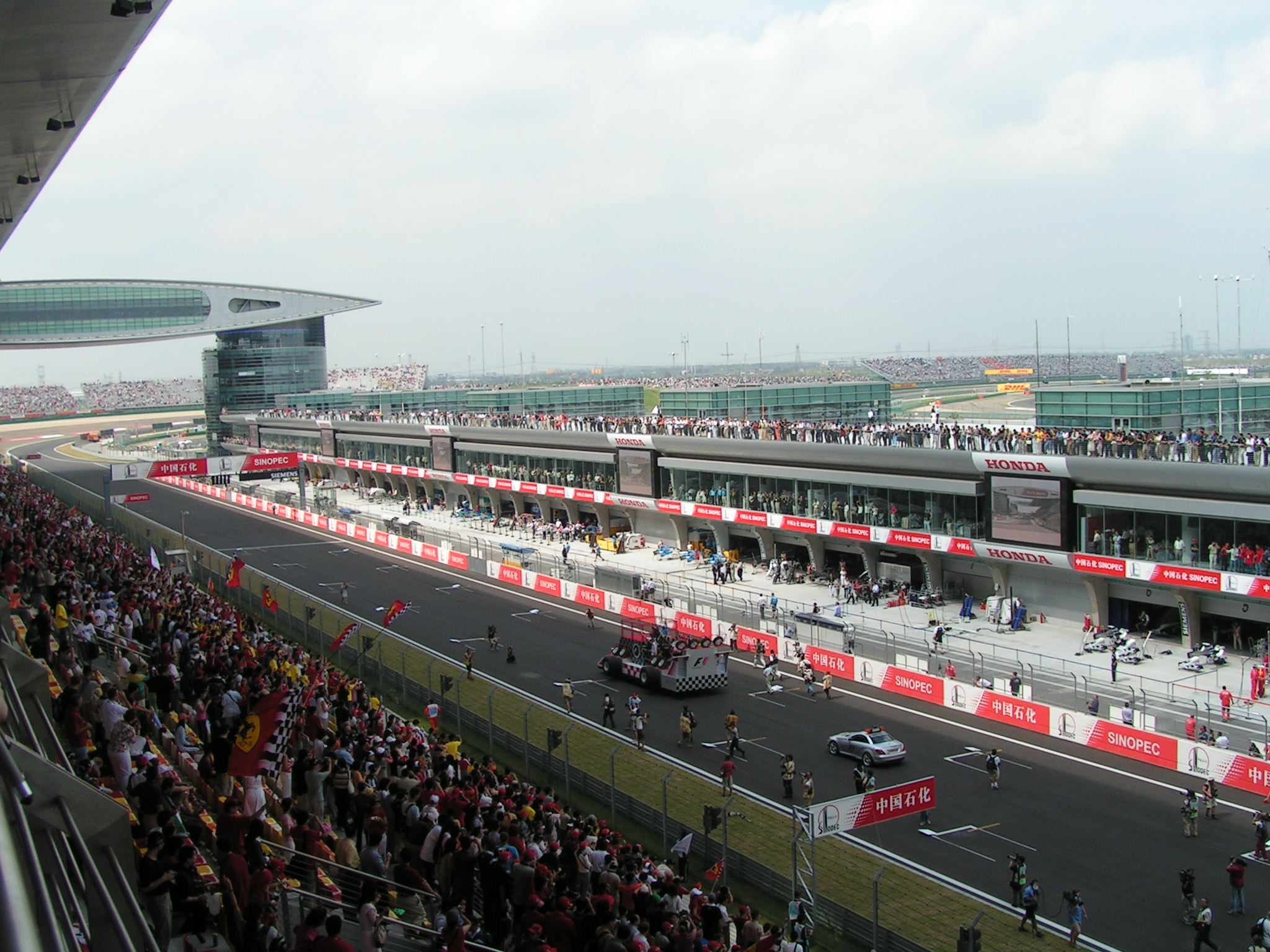 Blick von Haupttribüne auf die Boxengasse, links der futuristische Kontrollbereich. Selbst fotografiert, gemeinfrei